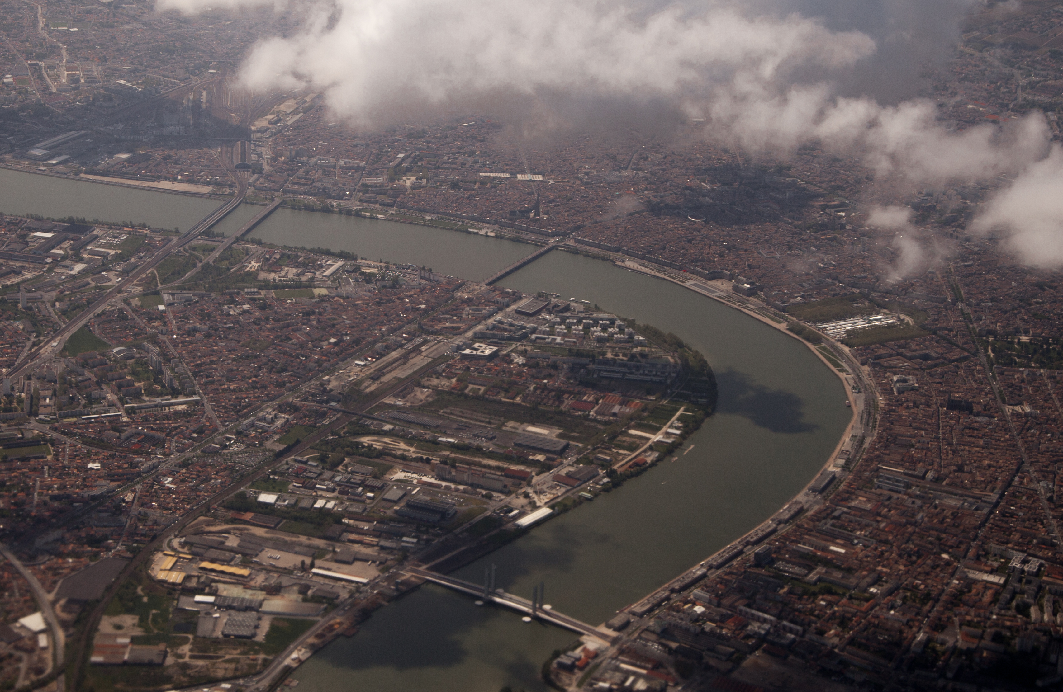 La ville de Bordeaux depuis un vol Ryanair au décollage. La Garonne. Les quais. Place des Quinquonces. Pont Chaban Delmas. Pont de Pierre. Pont Saint Jean. Rive droite et Rive gauche. Vue aérienne. The city of Bordeaux from a Ryanair flight just after the take-off. The Garonne. Quays. Square des Quinquonces. Bridge Chaban Delmas. Bridge Saint Pierre. Right bank and Left bank. Aerial view.